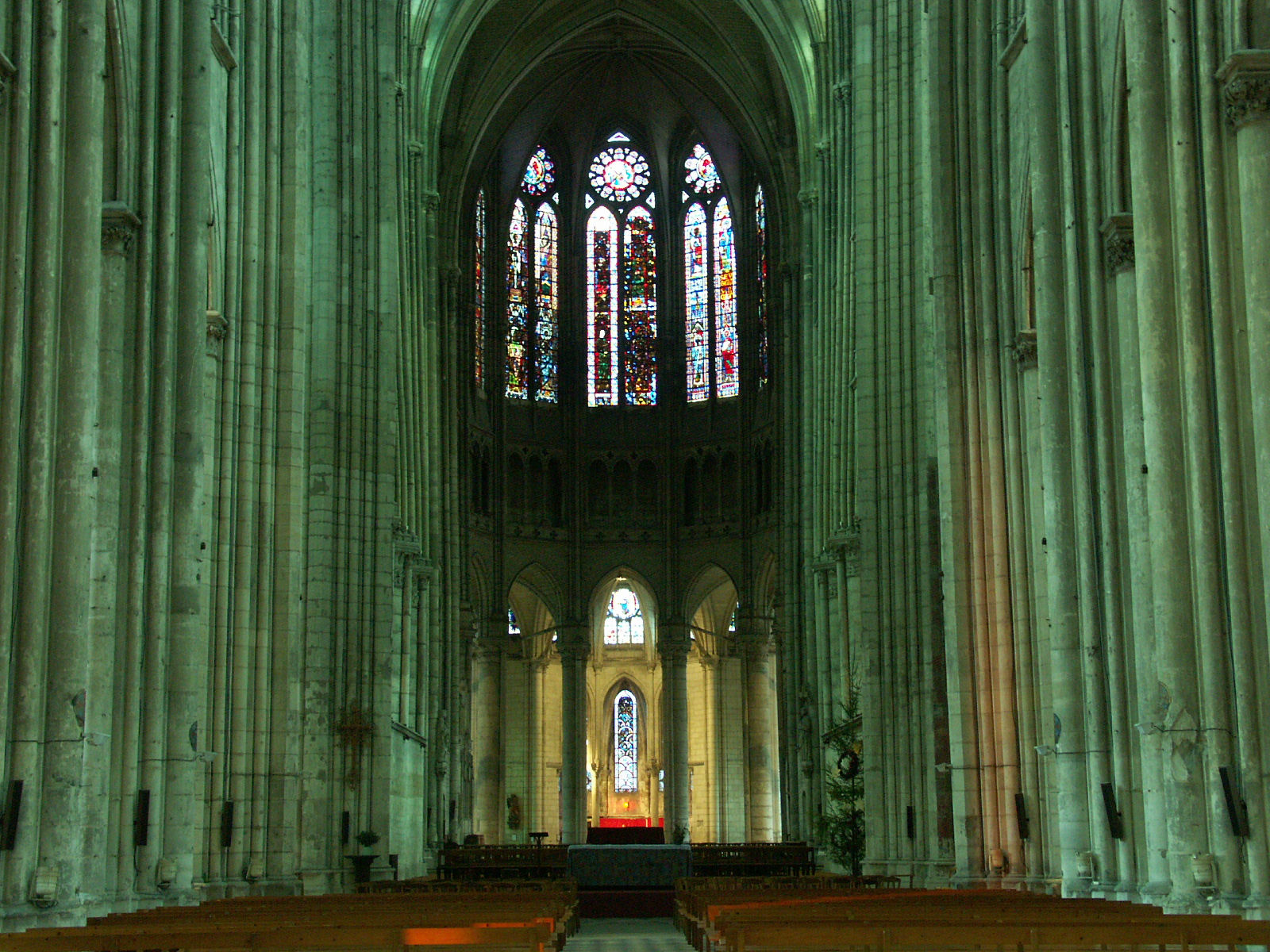 Basilique Saint-Quentin, France